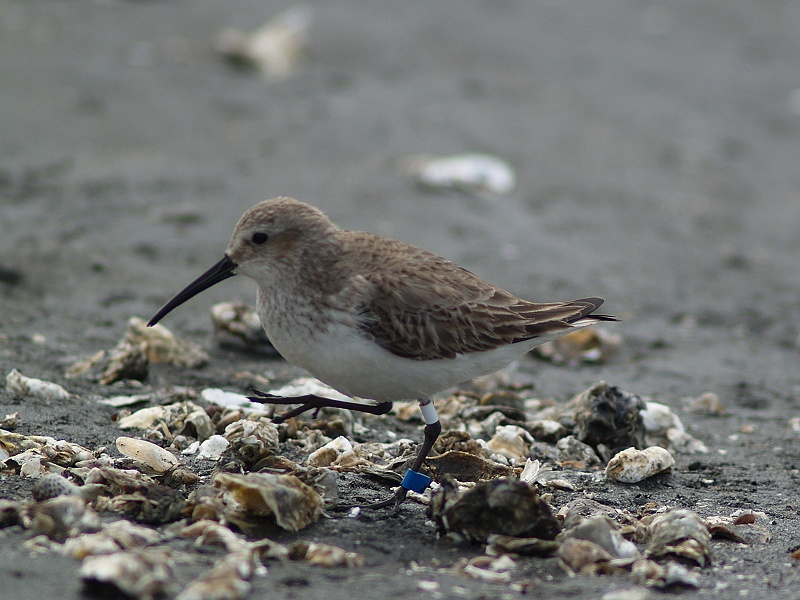 Calidris alpina 黑腹濱鷸